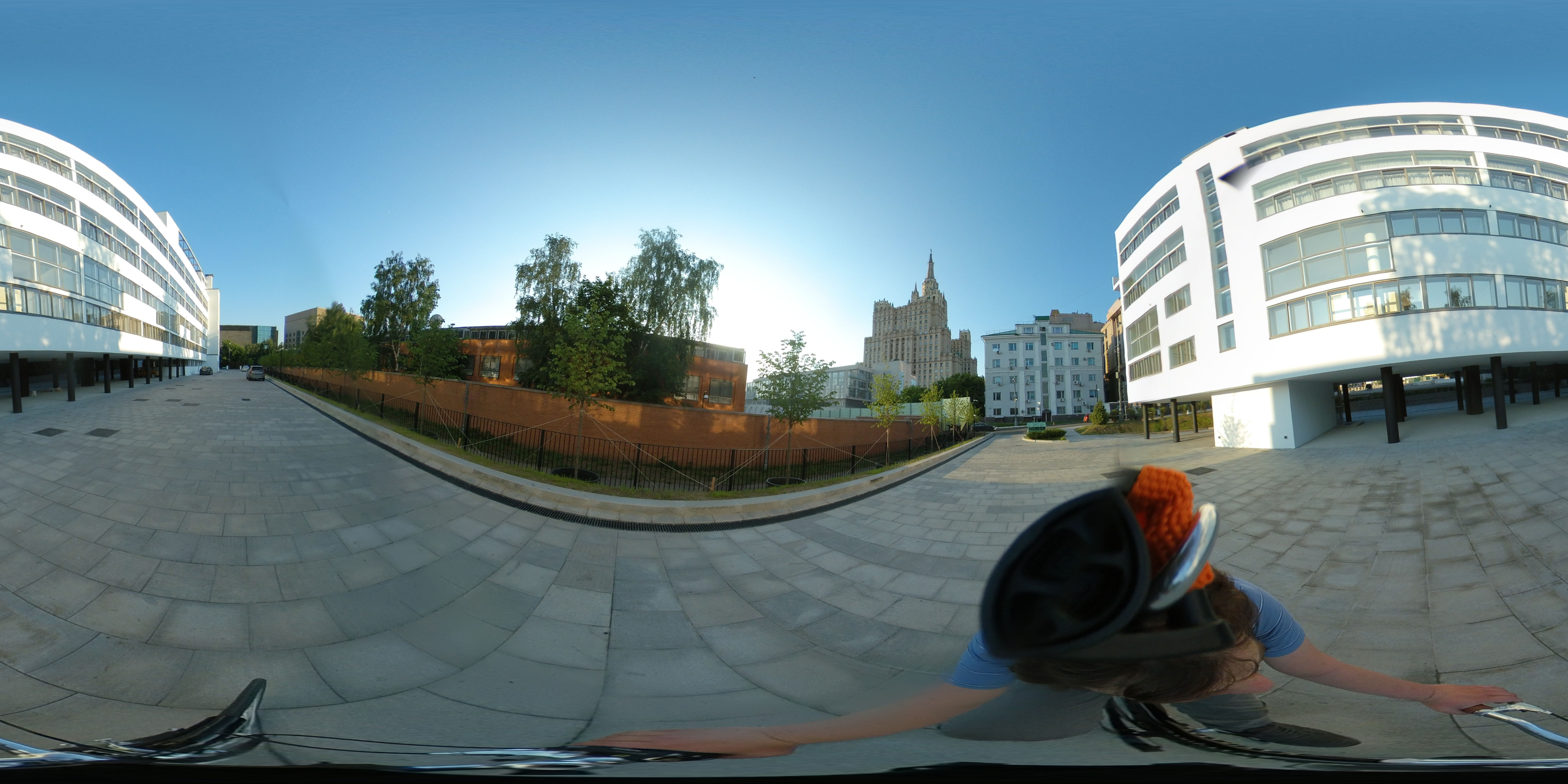 Narkomfin building 2020-06